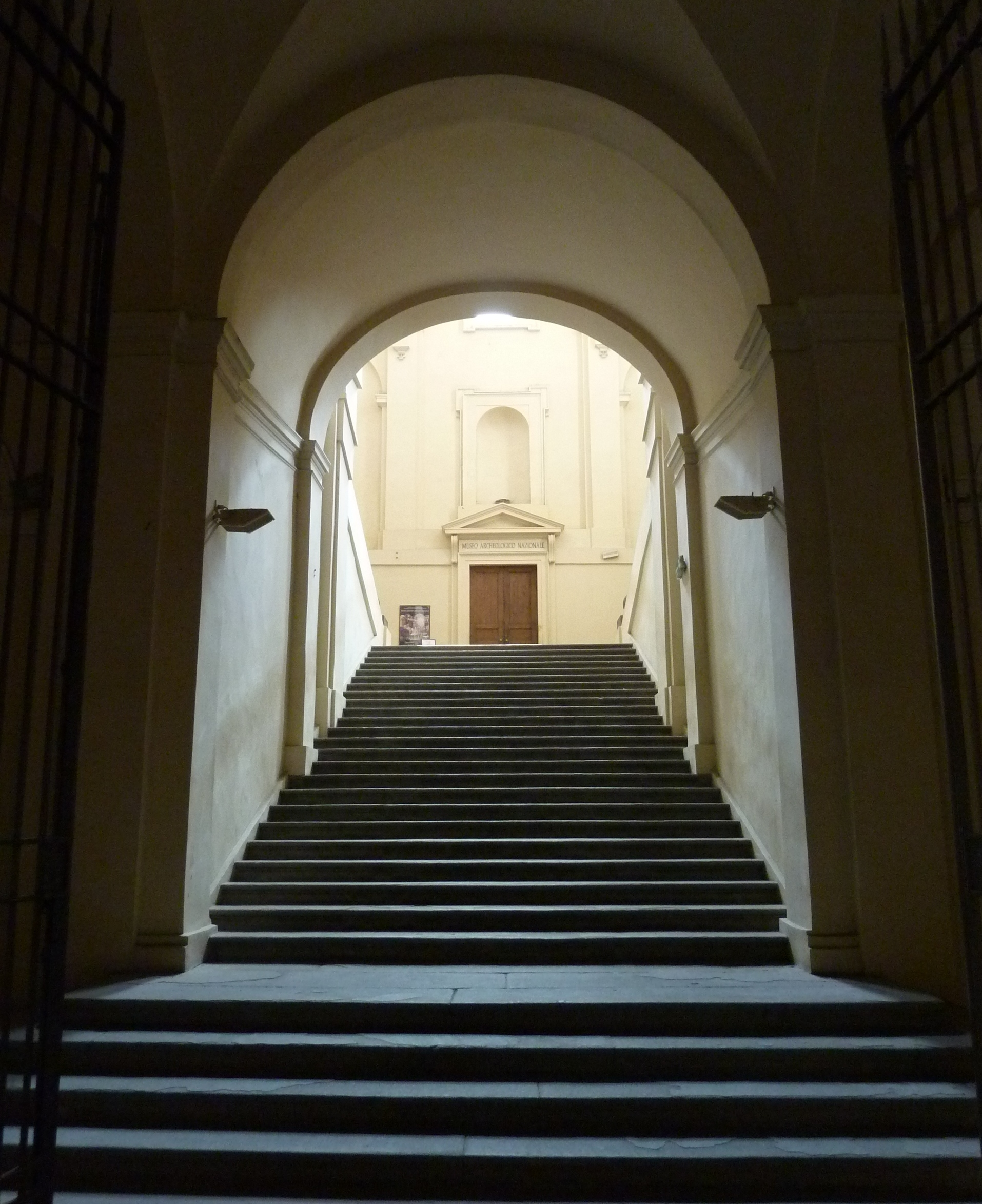 Lo scalone della Pilotta che porta al Museo archeologico nazionale di Parma.